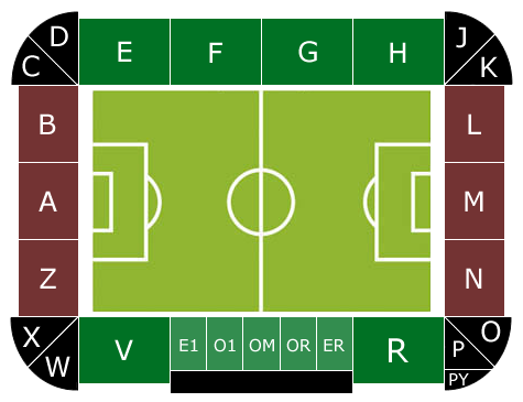 de Goffert stadium